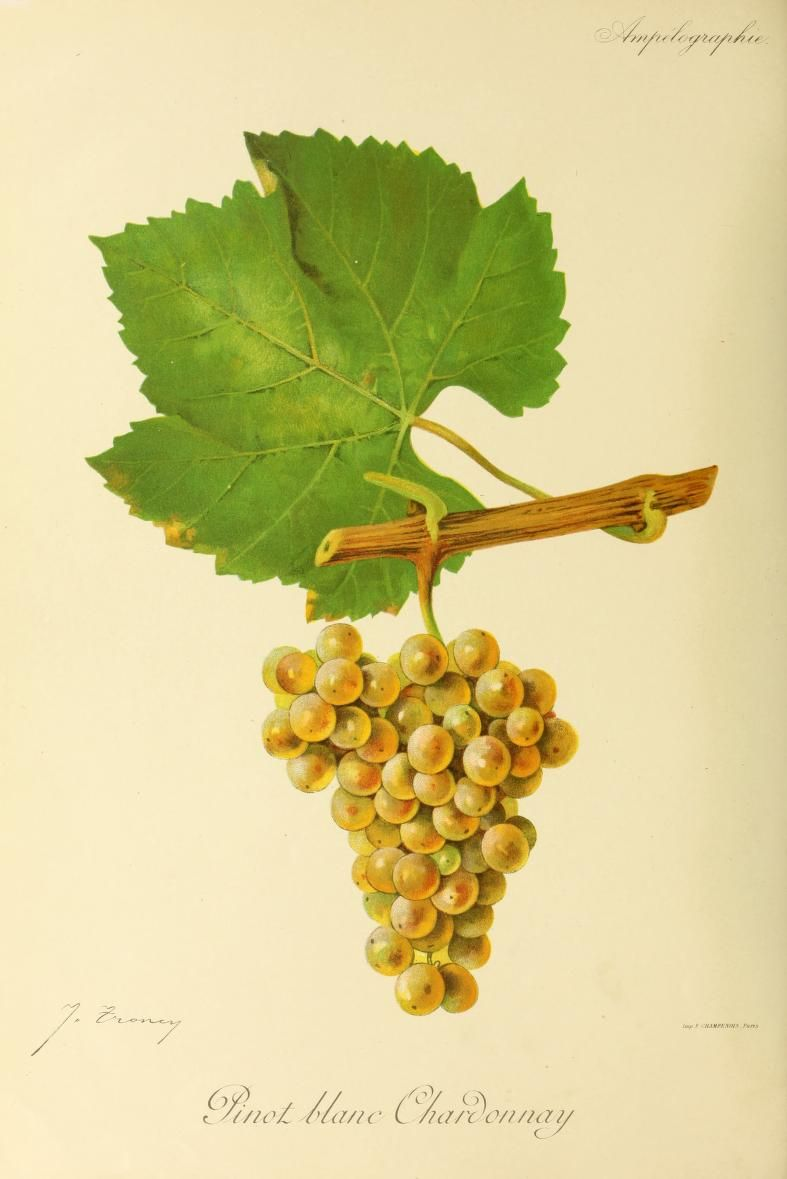 Illustration du cépage Pinot blanc Chardonnay par Jules Troncy dans l'ouvrage "Ampélographie : traité général de viticulture" publié sous la direction de P. Viala & V. Vermorel avec la collaboration de A. Bacon, A. Barbier, A. Berget [et al.] - Date de l'édition originale : 1901-1910